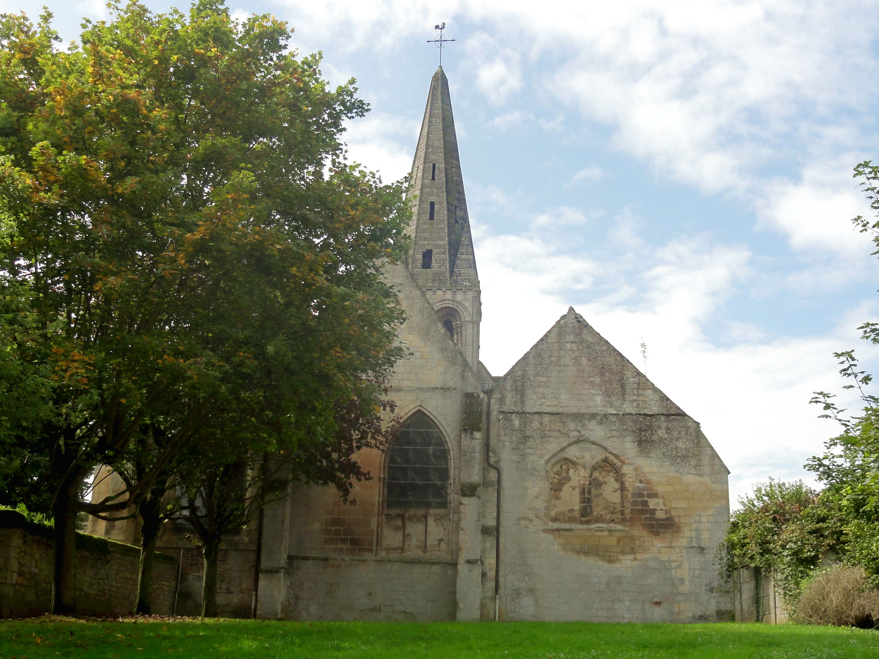 Chevet.